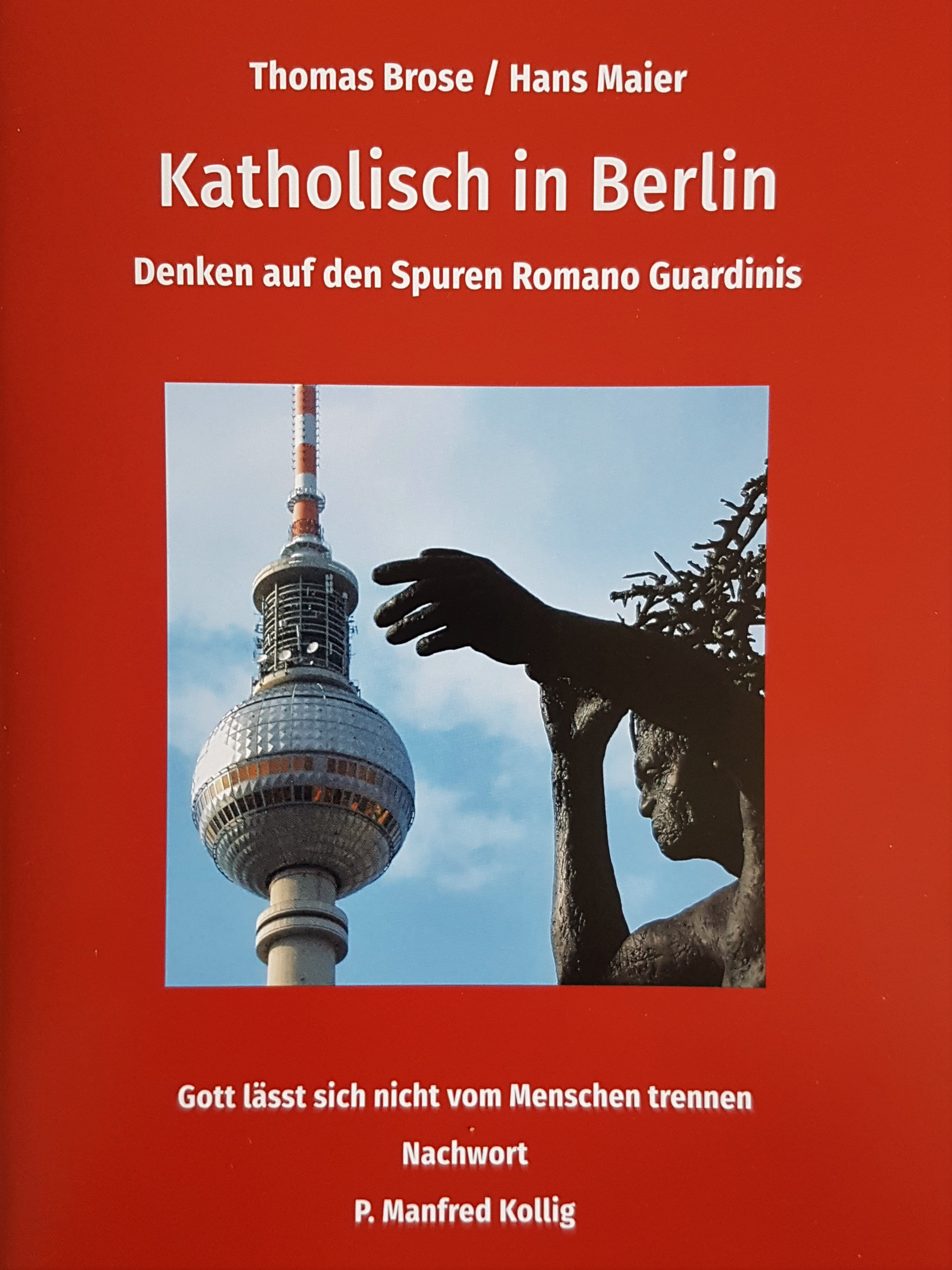 Cover des von Thomas Brose und Hans Maier veröffentlichten Buches "Katholisch in Berlin".